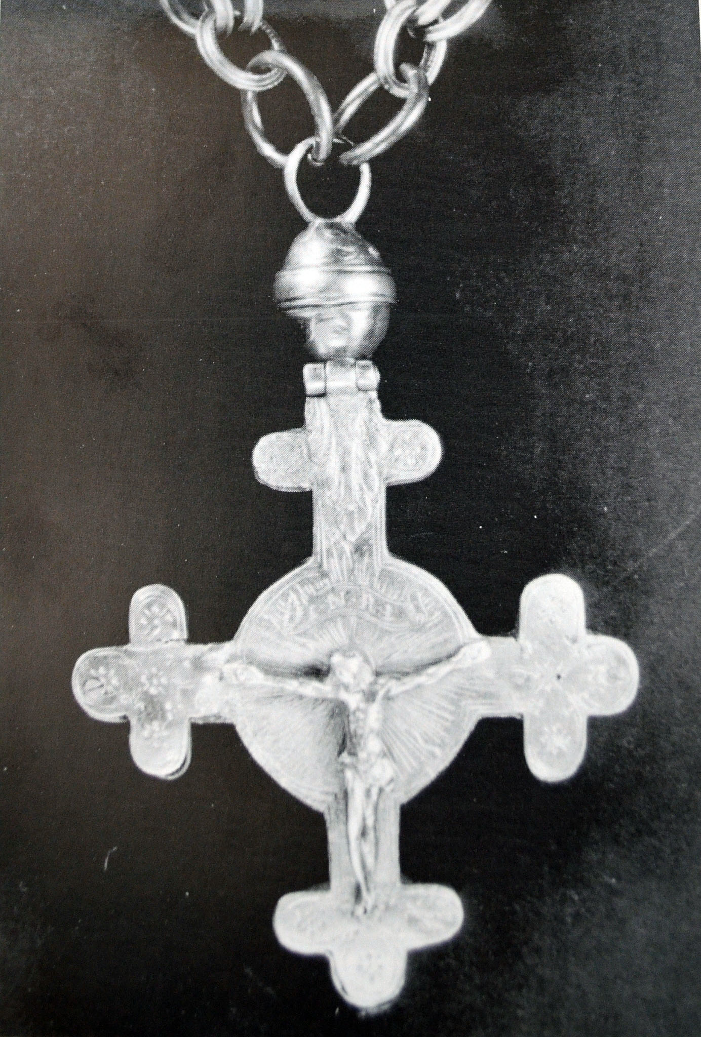 Schützenkette der St. Hubertusschützenbruderschaft